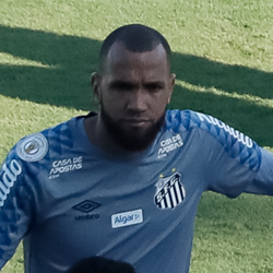 (Santos - SP, 16/11/2019) Partida de futebol Santos e São Paulo na Vila Belmiro. Foto: Isac Nóbrega/PR